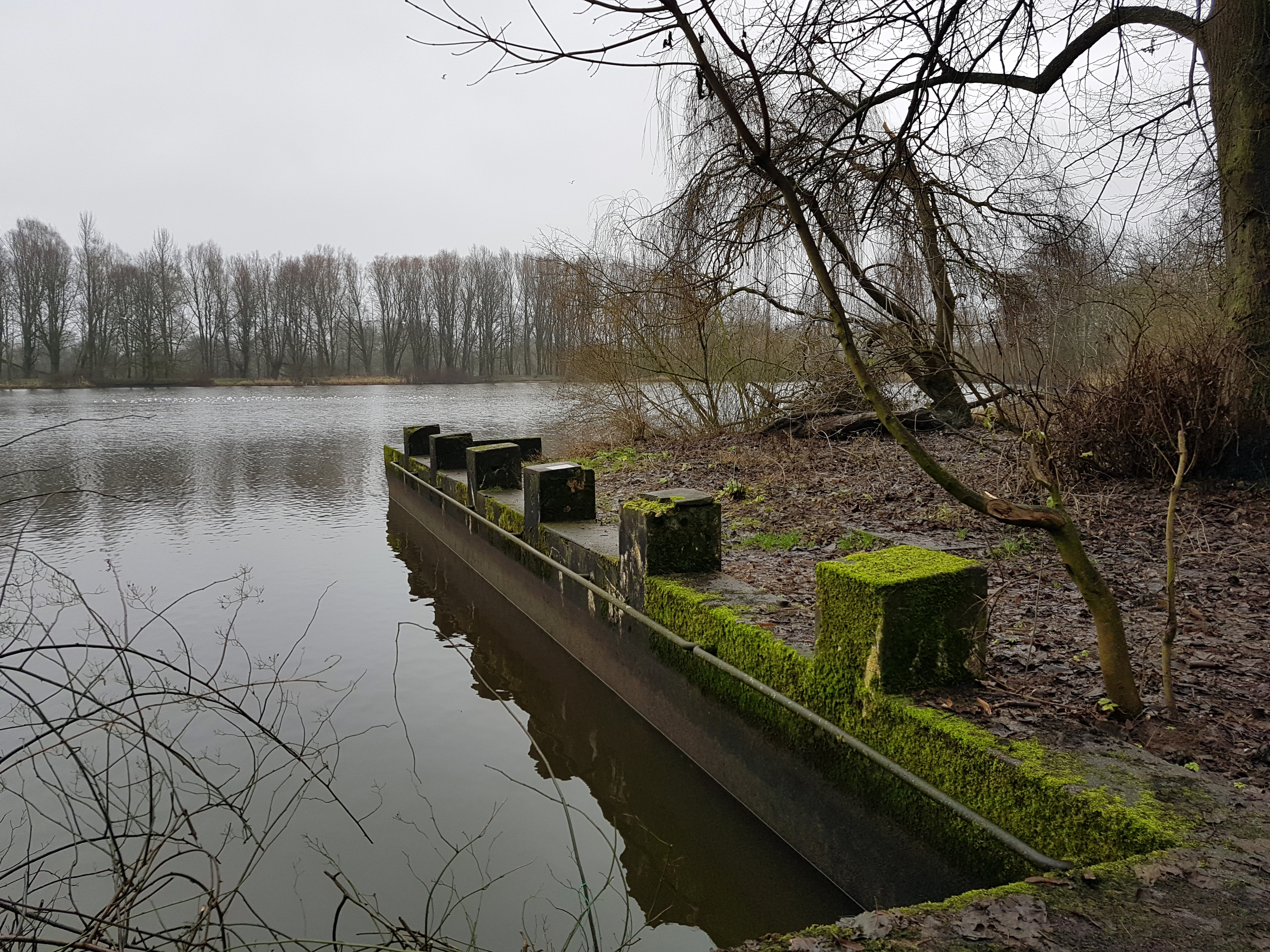 Alte Badeanstalt am Delmegrundsee in Delmenhorst, auch Mili genannt.